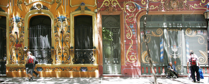 Edificios decorados con filetes, calle Jean Jaures 709